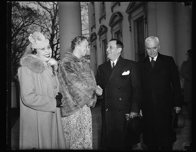 El Dr. Calderón Guardia y su esposa son recibidos por la primera dama de los Estados Unidos (1940)